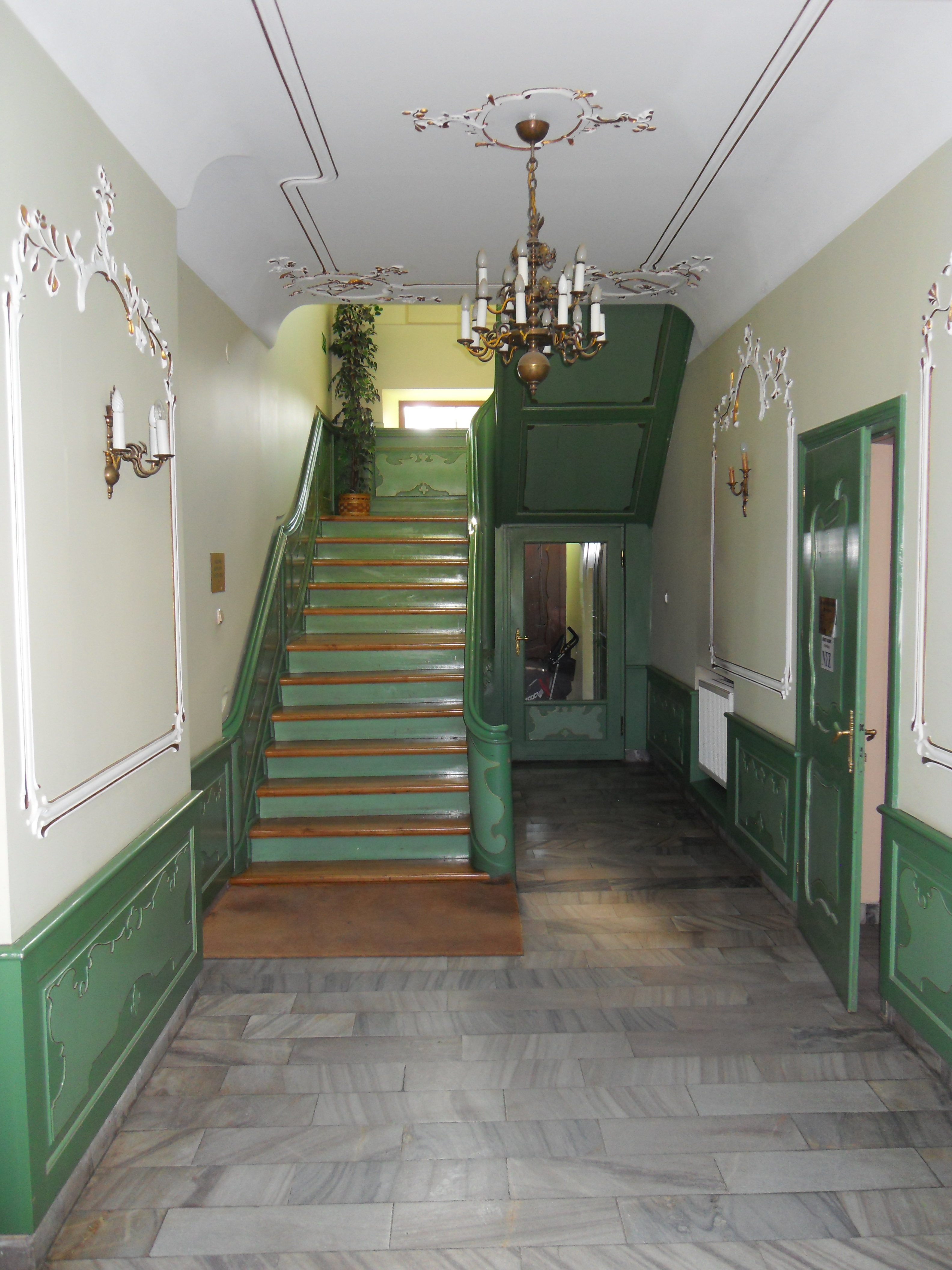 Gdańsk Wrzeszcz Dolny, ul. Wajdeloty 13, parter.